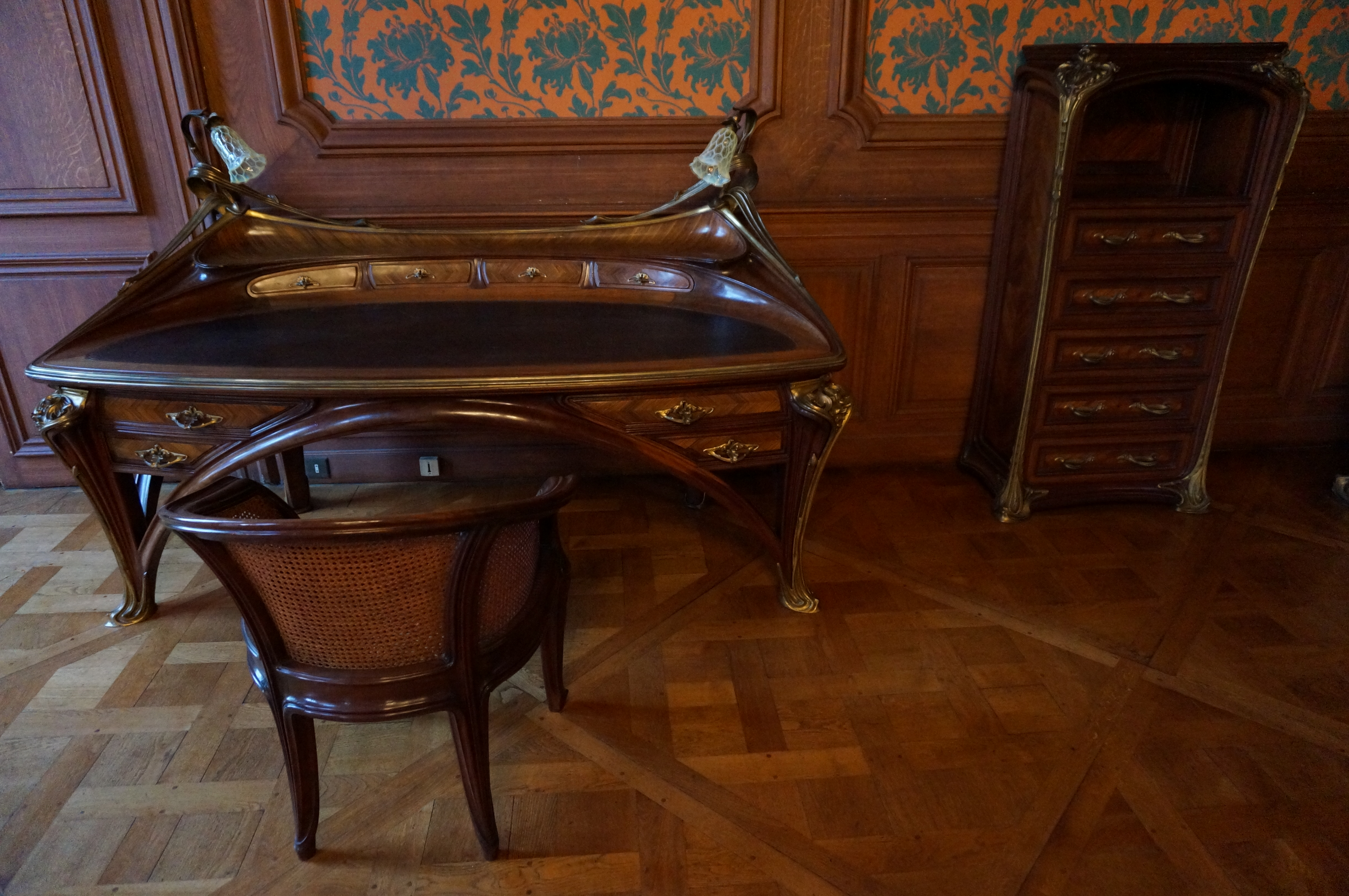 Salon de Napoléon du Palais du Gouvernement au premier étage, commande Ferdinand Foch à Louis majorelle.